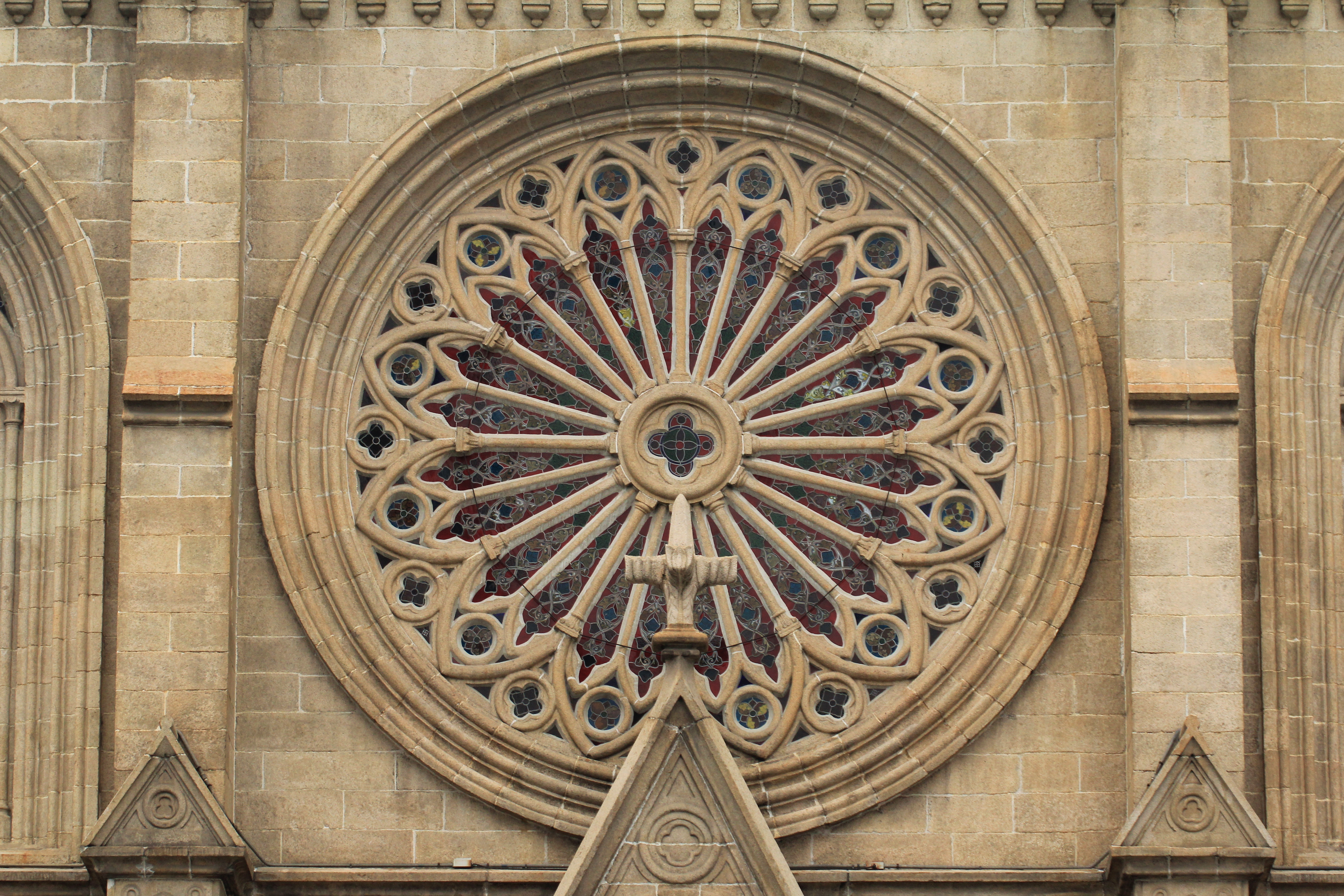 石室圣心大教堂正面花窗